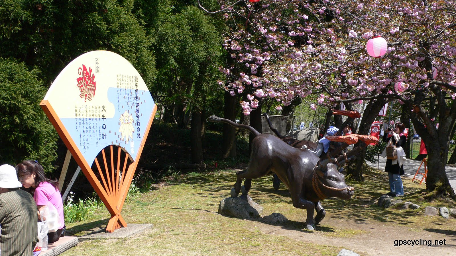 源平倶利伽羅合戦の地